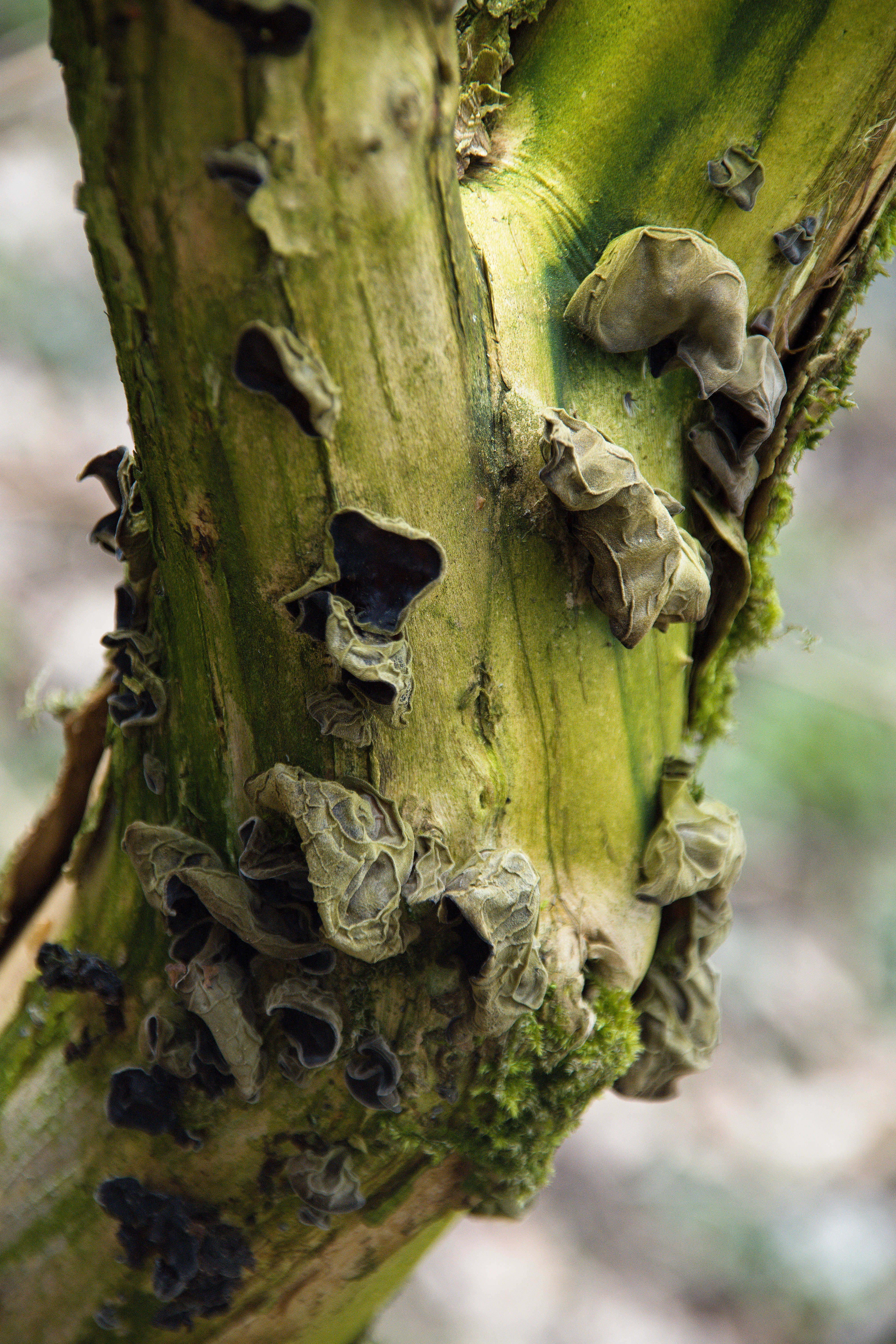 Rok stará bolcovitka, která přežila zimu, porostlá řasami.